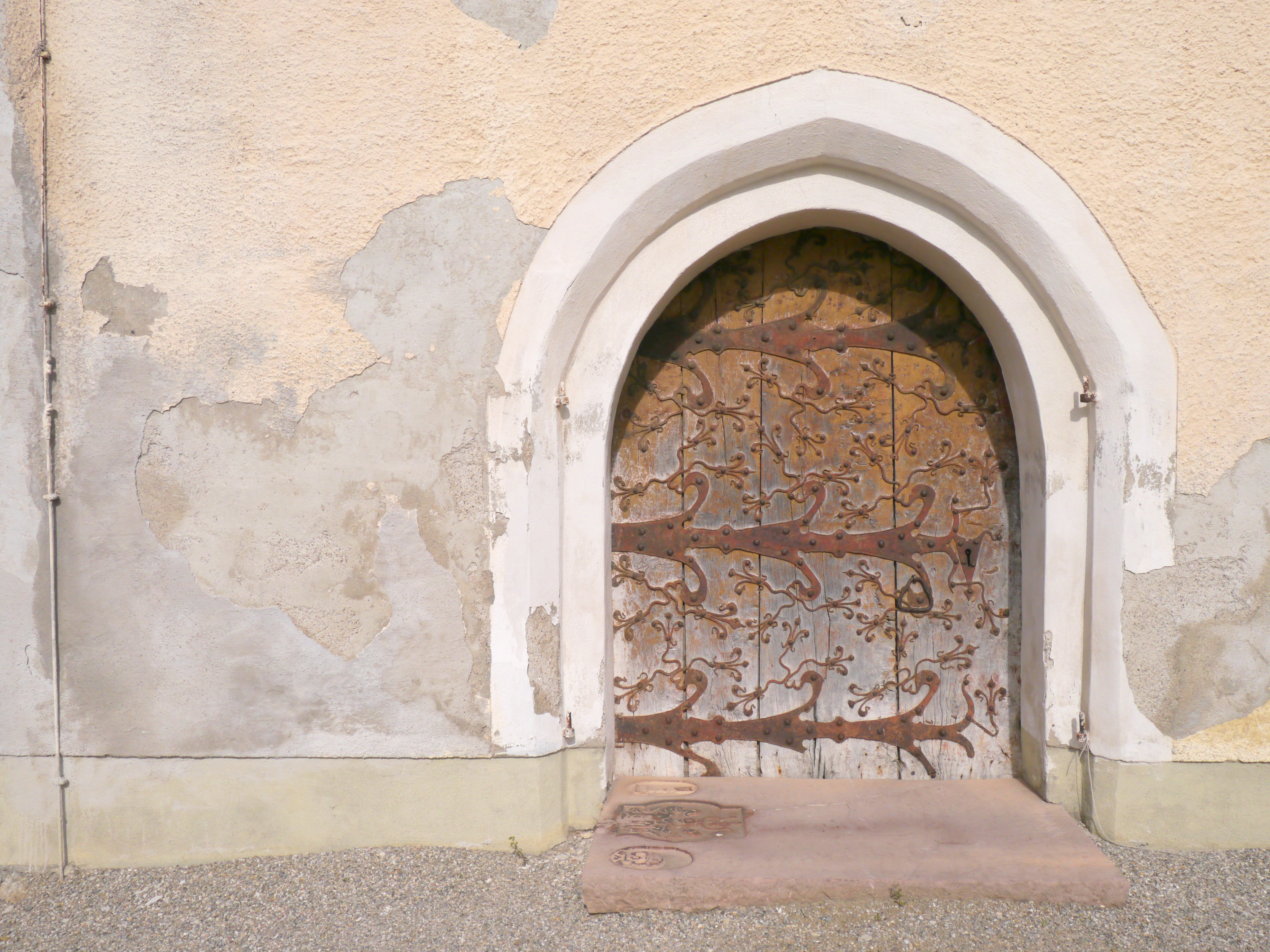 Kath. Pfarrkirche hl. Kunigunde und Friedhof